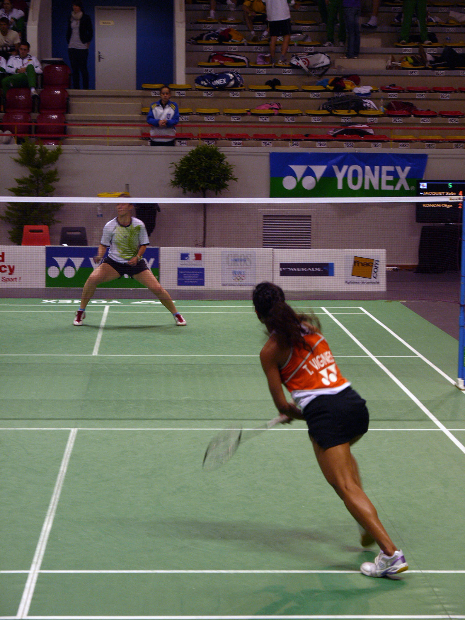 Mariya Diptan and Sashina Vignes Waran